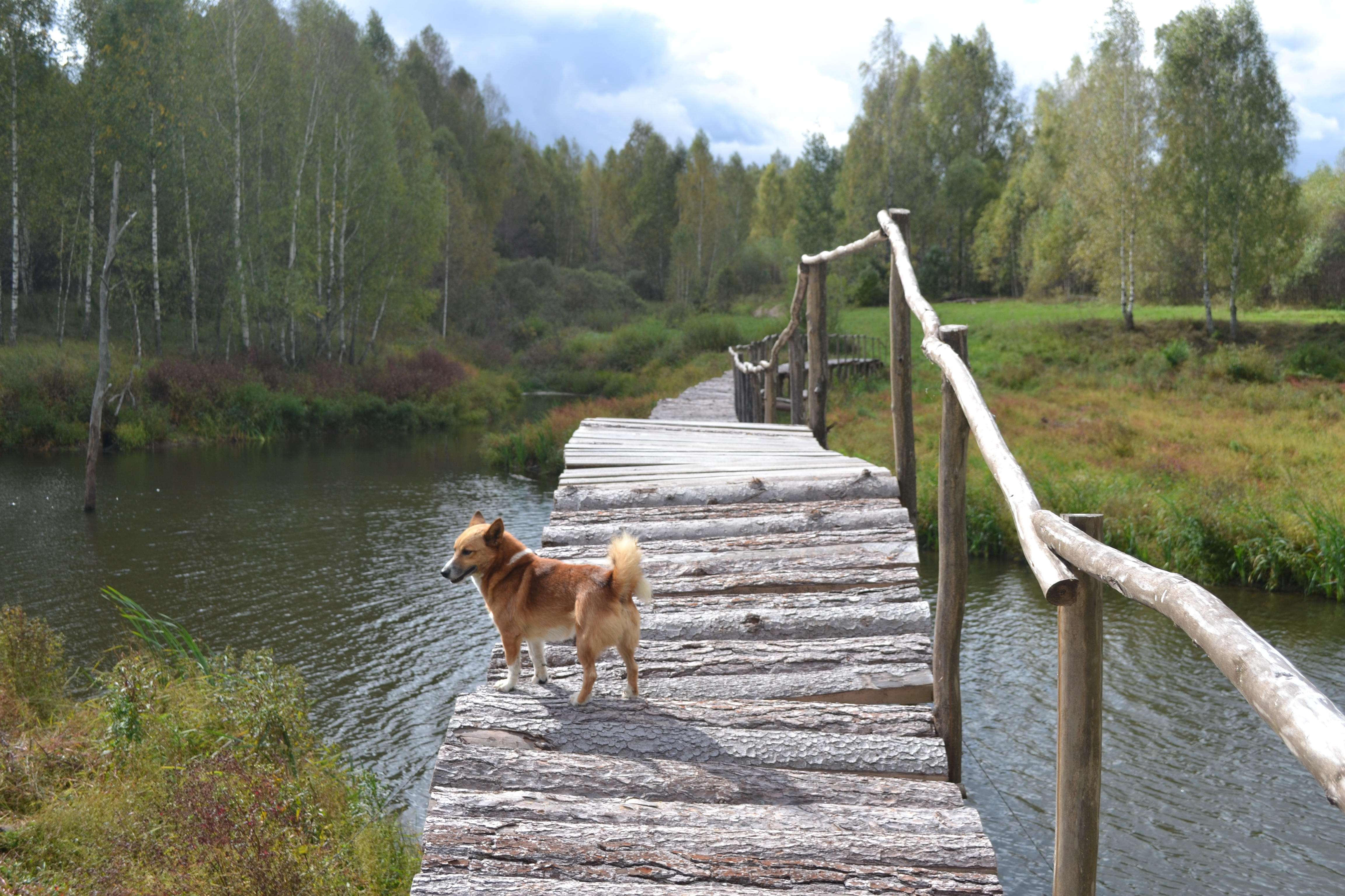 Мостик через пруд у села Уколица